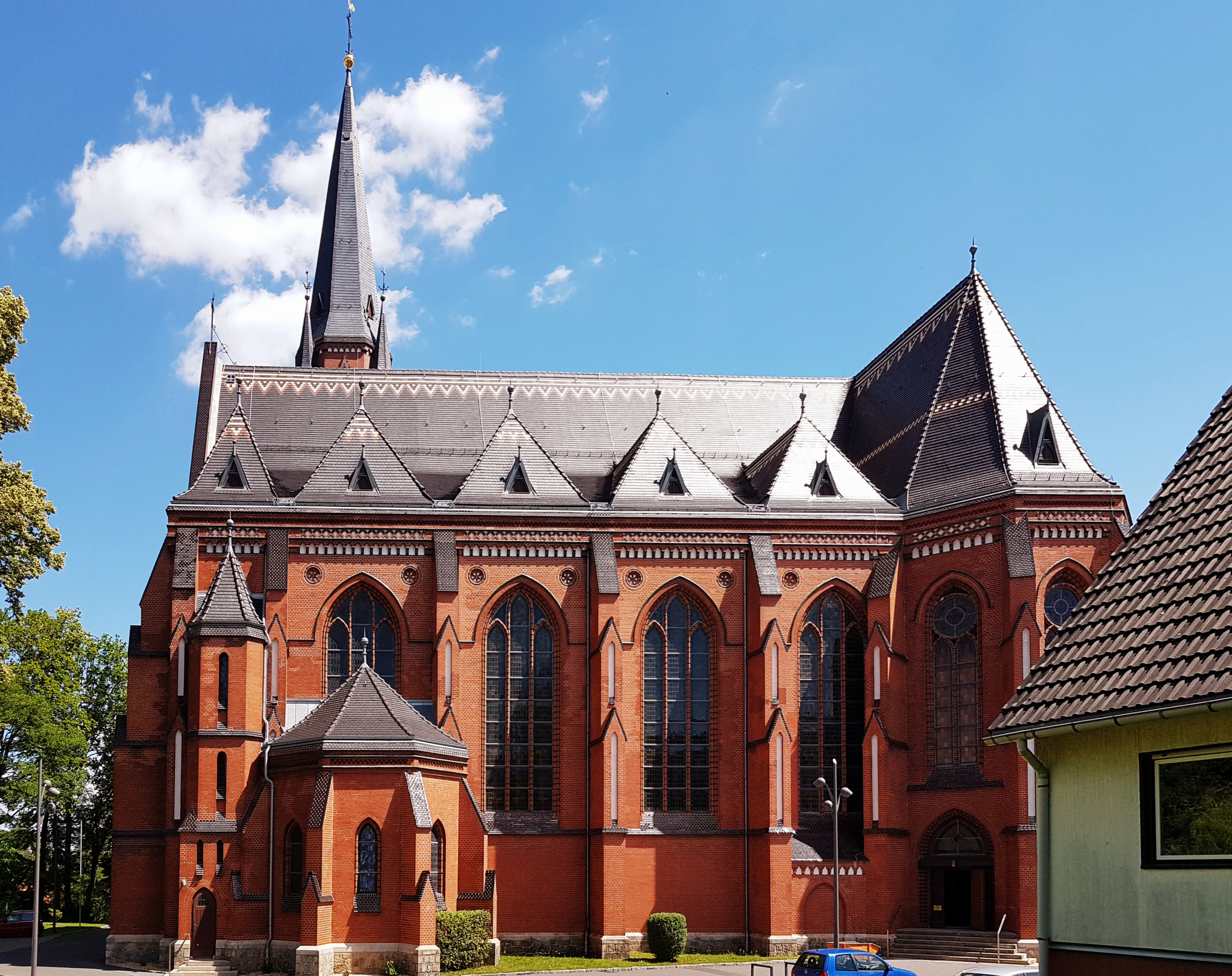 Görlitz, Kath. Bischofskirche St. Jakobus